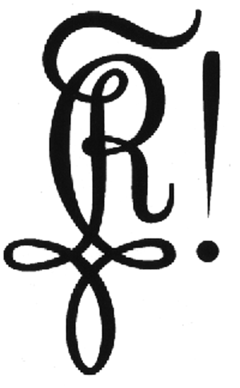 Zirkel der Marburger Burschenschaft Rheinfranken